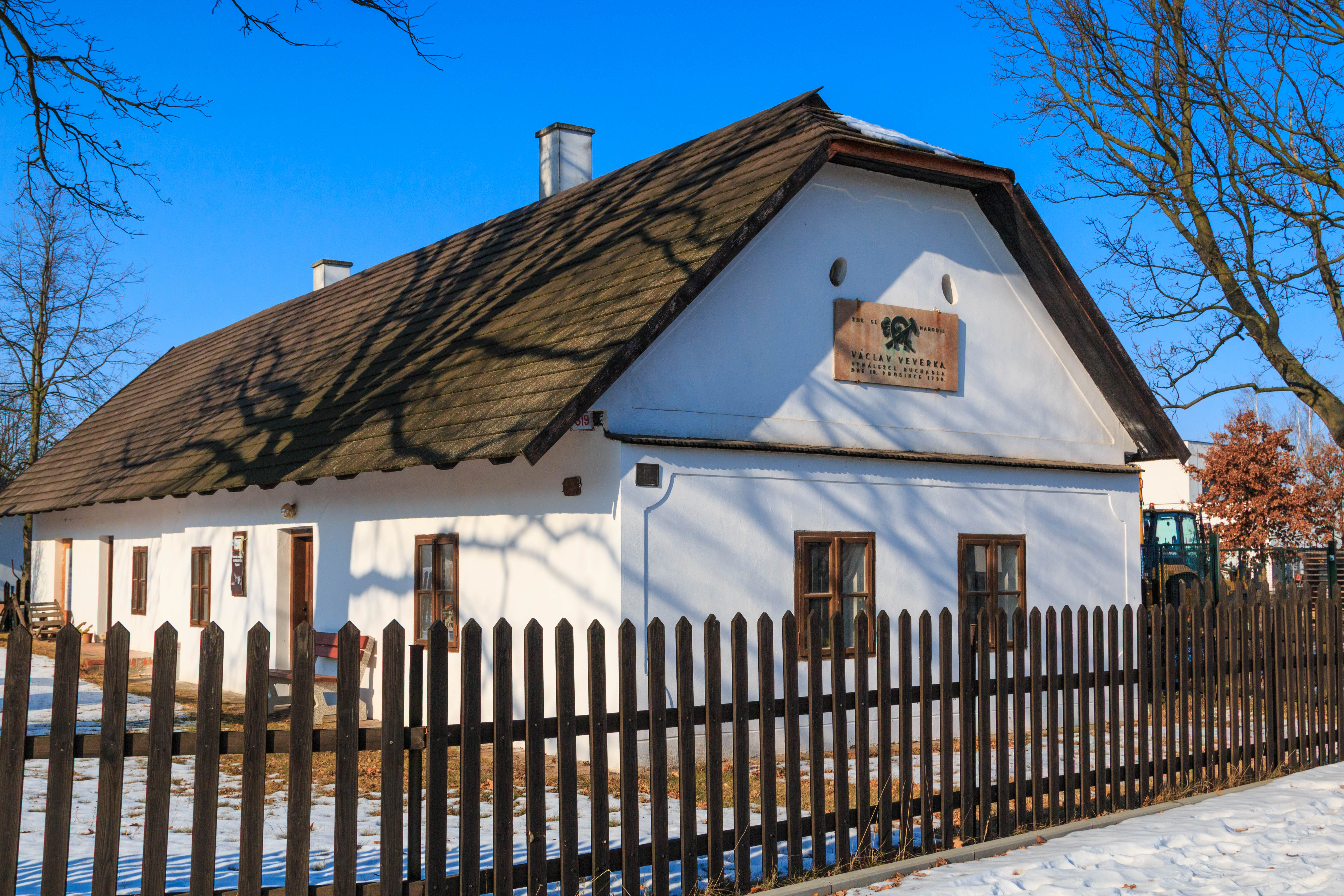 Rodný dům Václava Veverky, Veverkova 10, Rybitví.